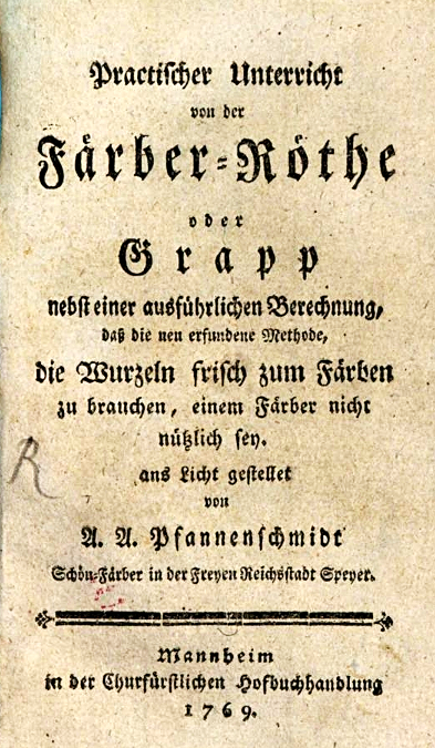 Titelblatt eines Buches des Speyerer Unternehmers Adrian Andreas Pfannenschmidt